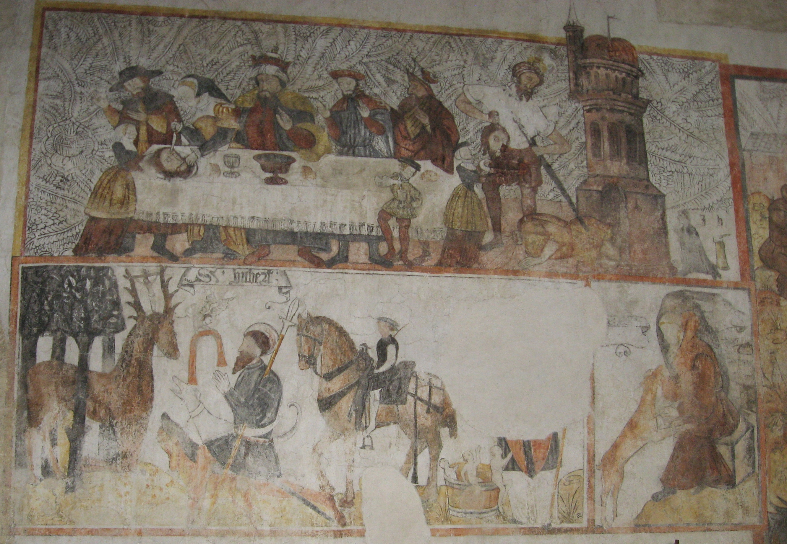 Eglise de Saint-Denis-d'Anjou : peintures murales intérieures, Département de la Mayenne (53), France. 1er register: chasse de Saint-Hubert, Saint-Nicolas, Saint-Ceneré; 2d registre: histoire de Saint-Jean-Baptiste: repas d'Hérode.